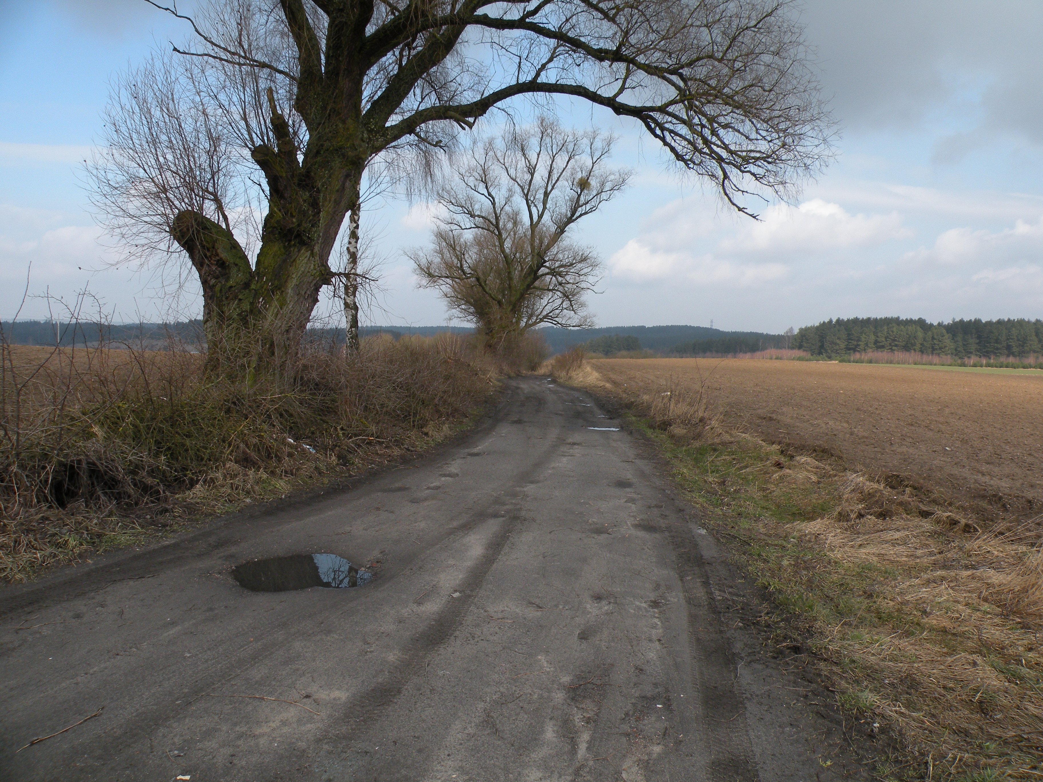 Wieś Redykajny, gmina Dywity